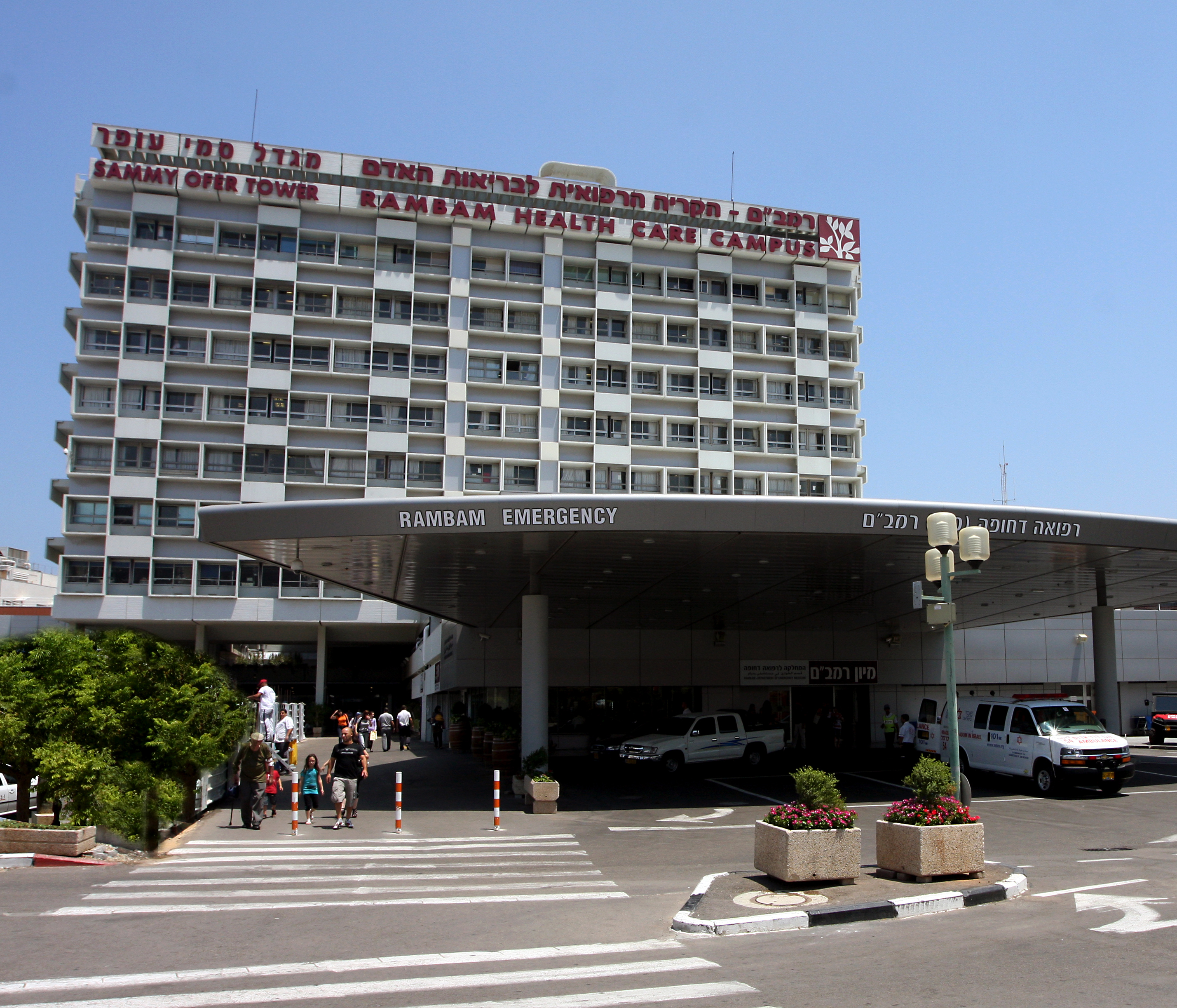 רמב"ם - הקרייה הרפואית לבריאות האדם, הבניין הראשי לאחר השלמת האגף הממוגן לרפואה דחופה